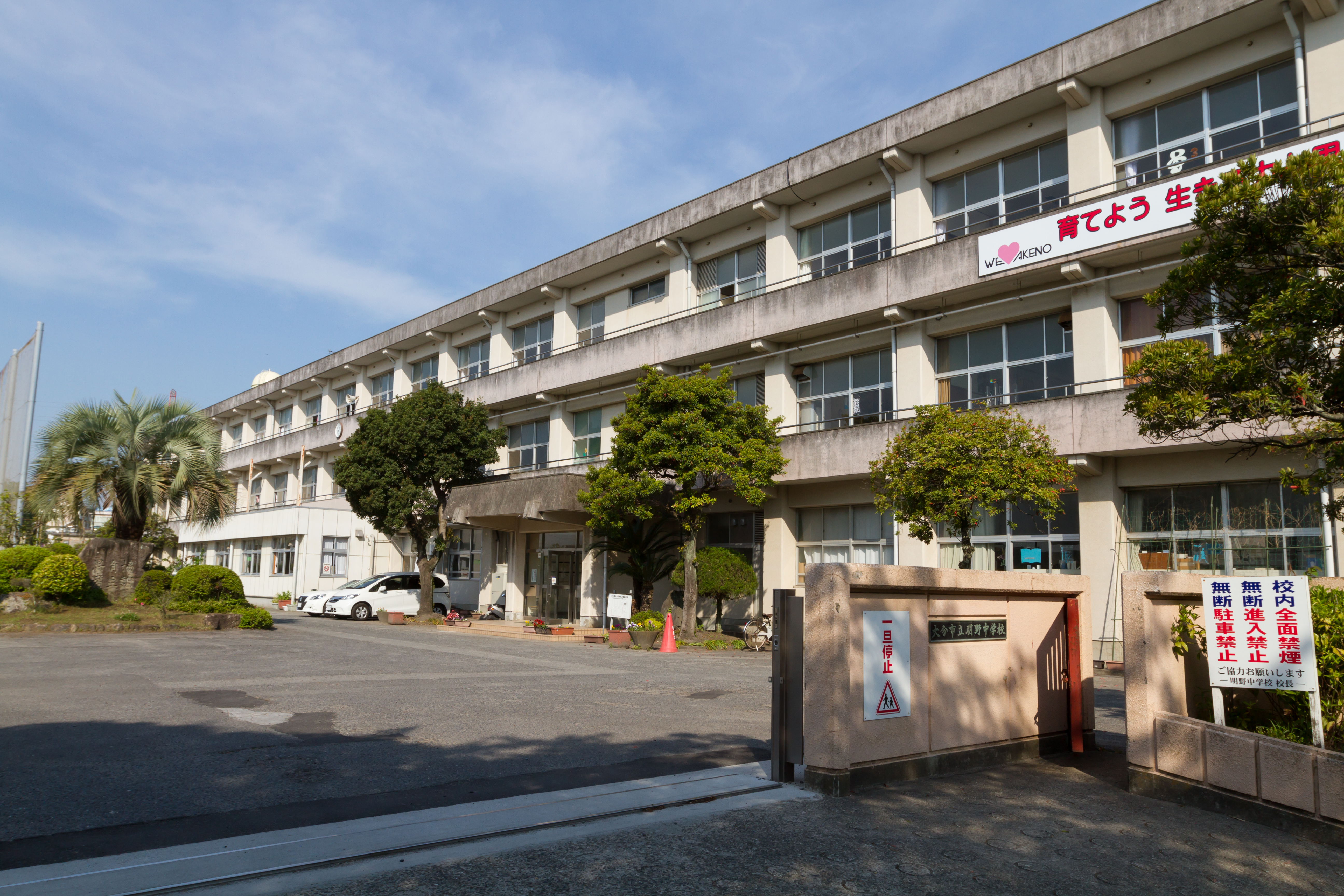 正門から見る南校舎